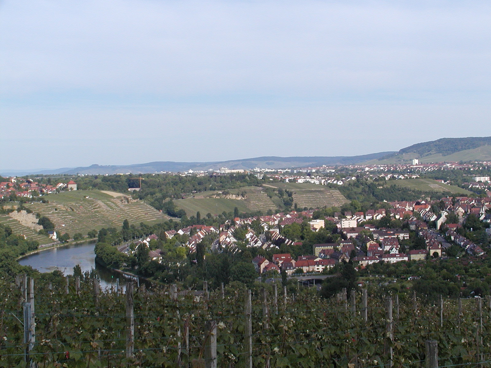 Blick auf die Neckarschleife Max-Eyth-See